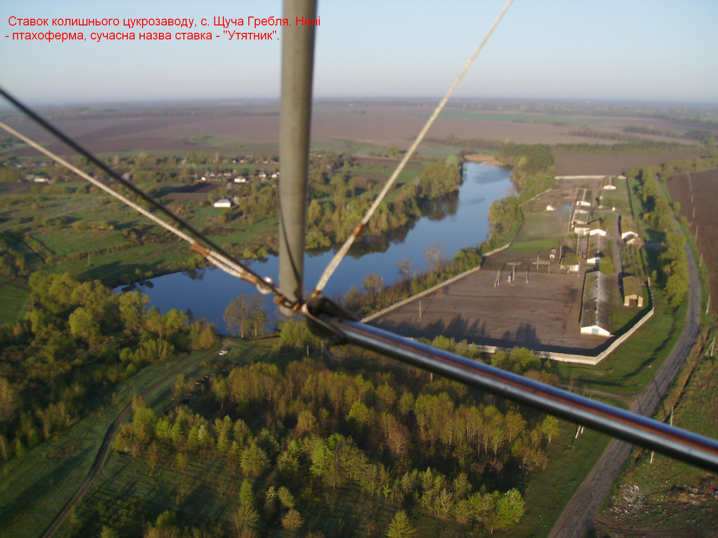 Ставок колишнього цукрового заводу, с.Щуча Гребля (Дмитрівська с/рада), сучасна назва - "Утятник", від птахоферми при ньому.